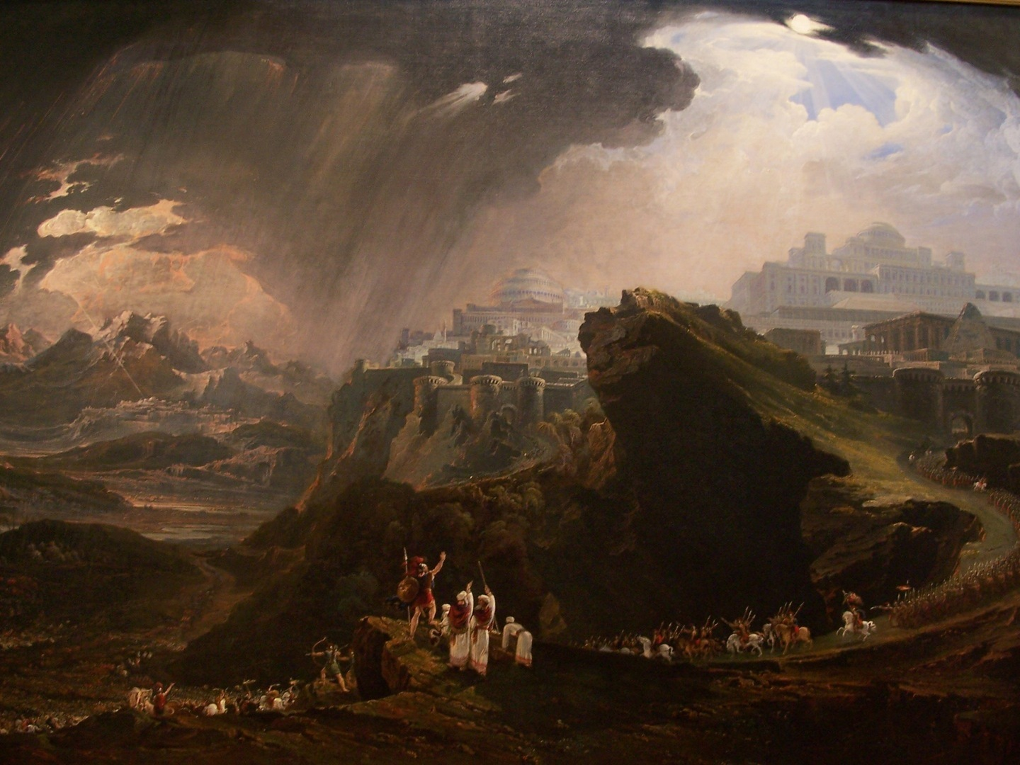 Yuşə peygəmbər dua edərkən